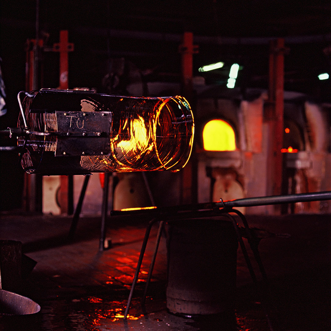 Glasproduktion Glashütte Lamberts